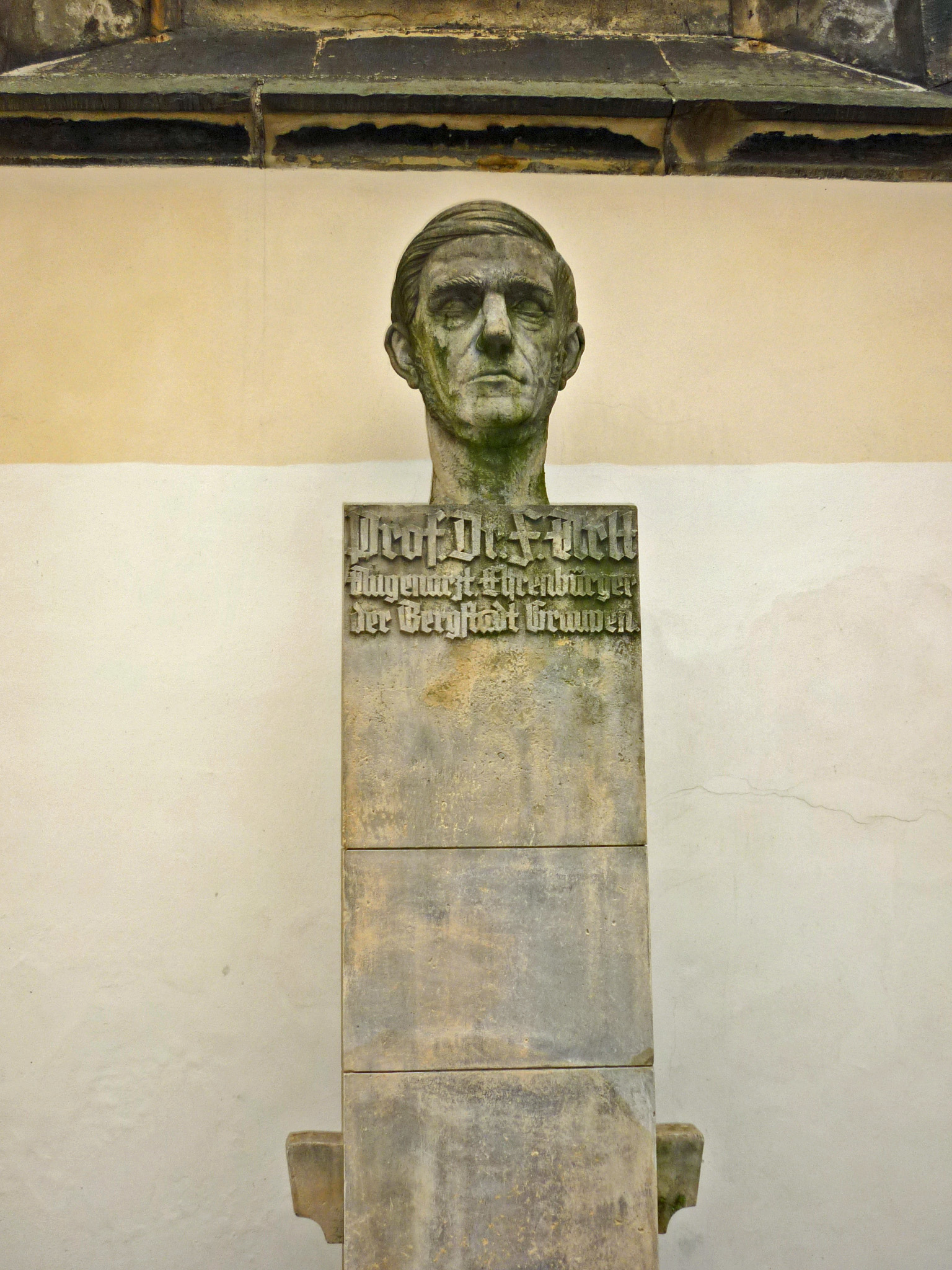 Denkmal zur Erinnerung an den Augenarzt Ferdinand von Arlt (1812-1887) an der Mariä-Himmelfahrtskirche in Graupen (Krupka)